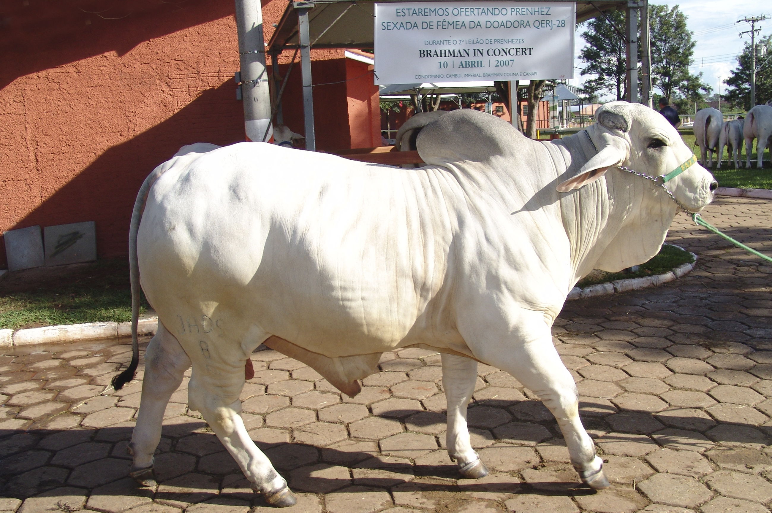 Touro da raça Brahman, em julgamento na EMAPA, Avaré, São Paulo, Brasil